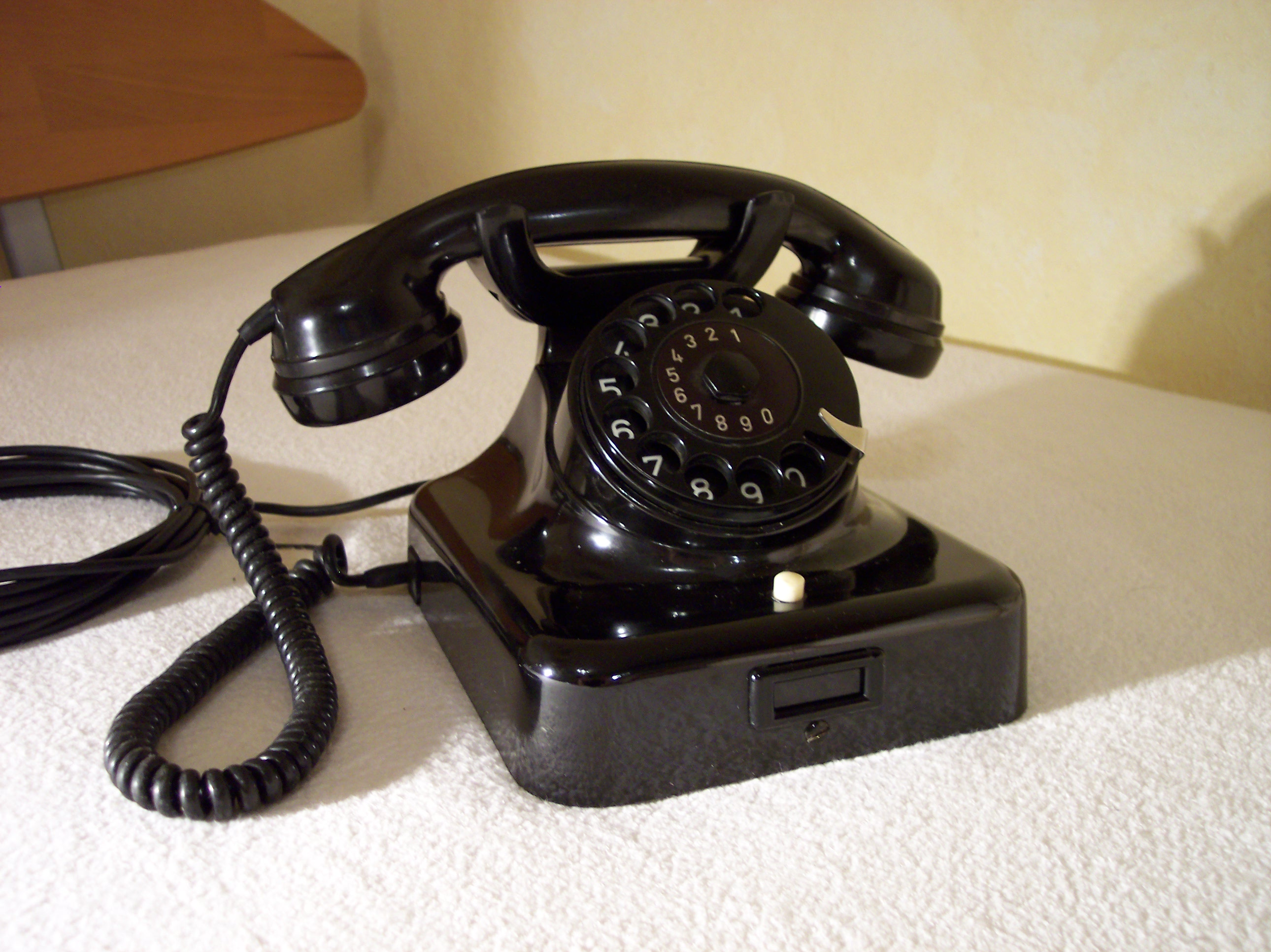 W49 Fernsprecher von HAGENUK, Baujahr 1958